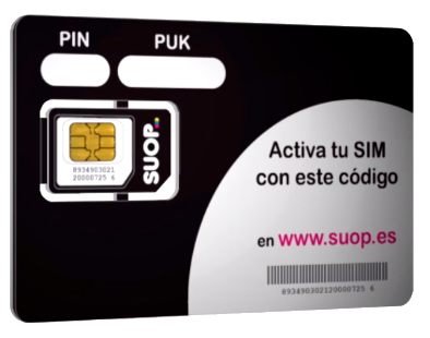 Detalle SIM Suop